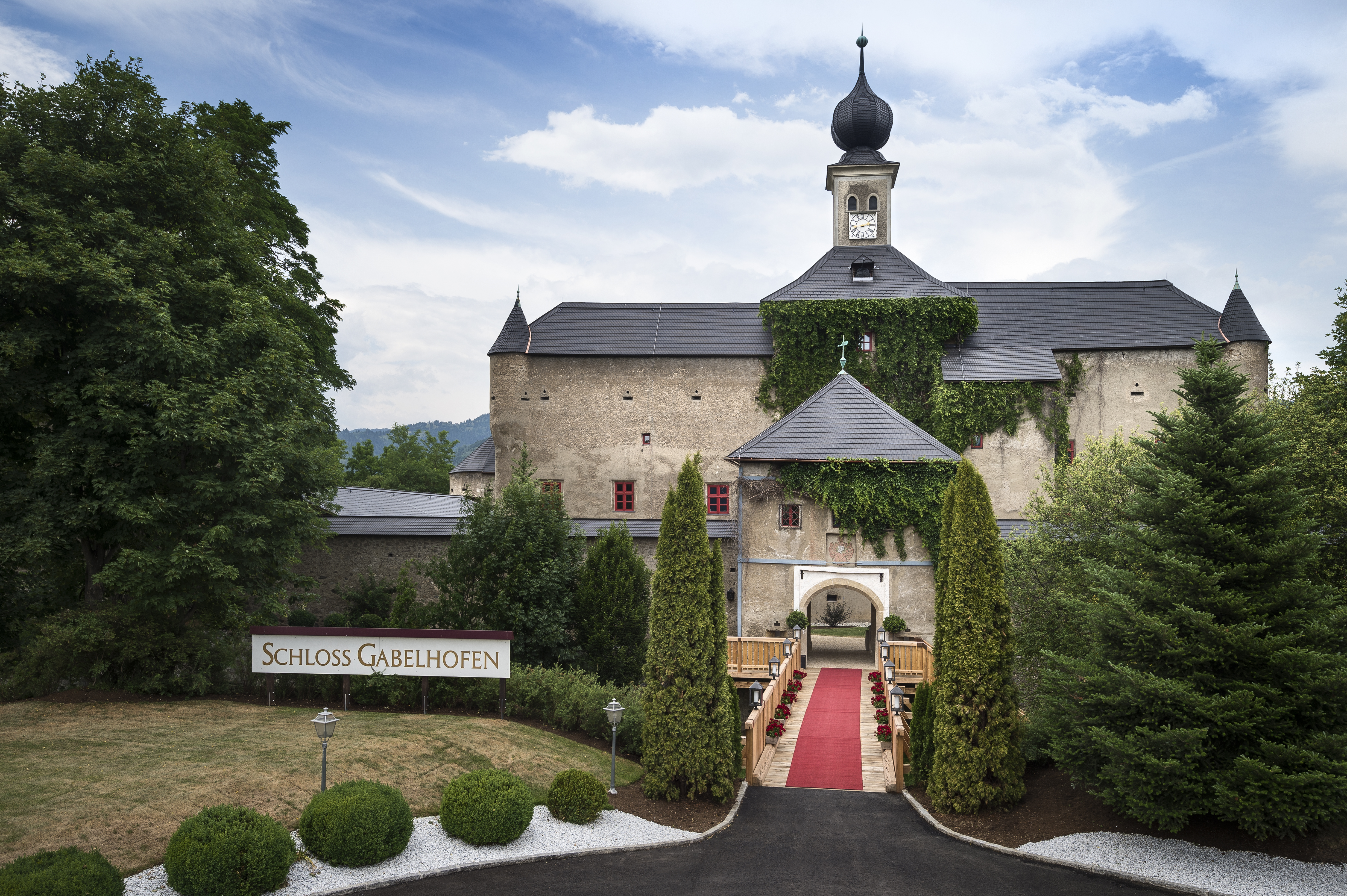 Schloss Außenansicht